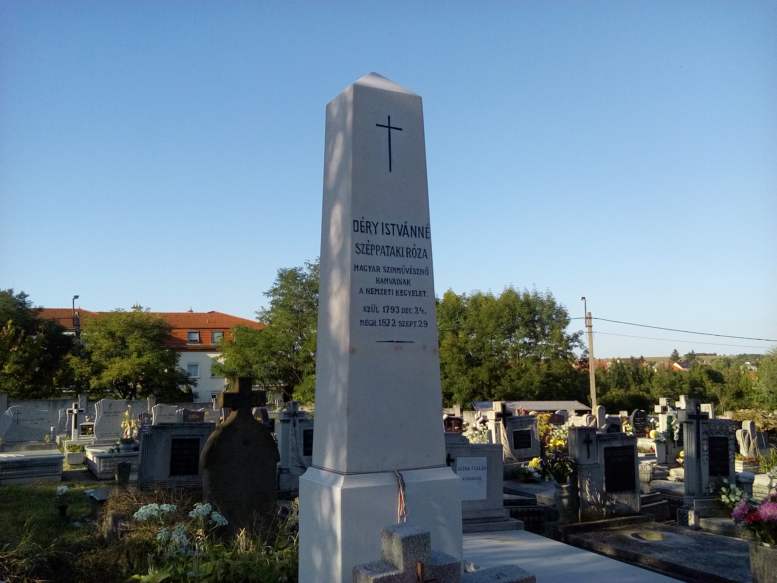 Déryné Széppataki Róza sírja a miskolci Szent Anna temetőben